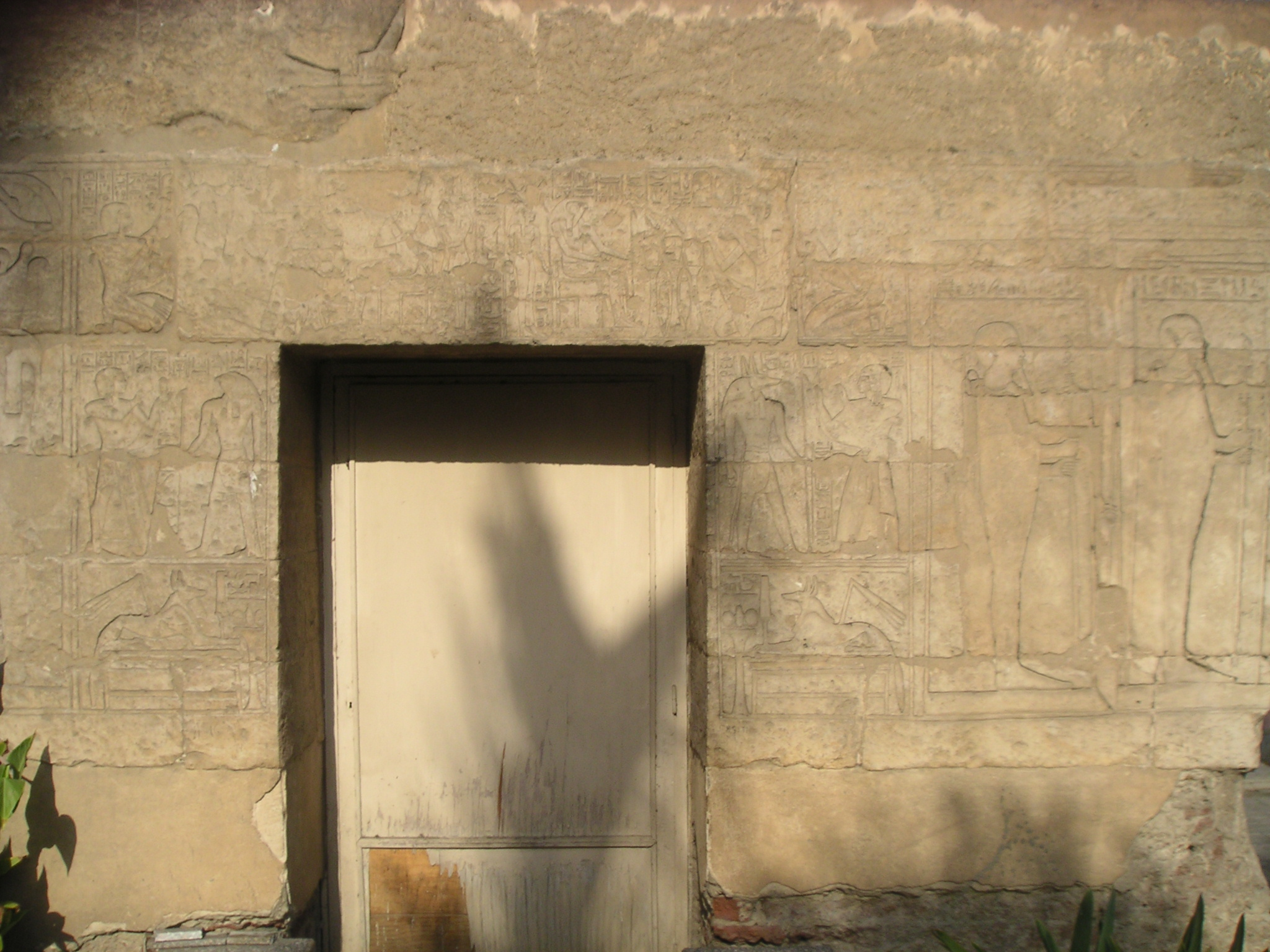 Vue de la chapelle funéraire de Sheshonq, Grand prêtre de Ptah, découverte à Memphis - Jardin du Musée du Caire